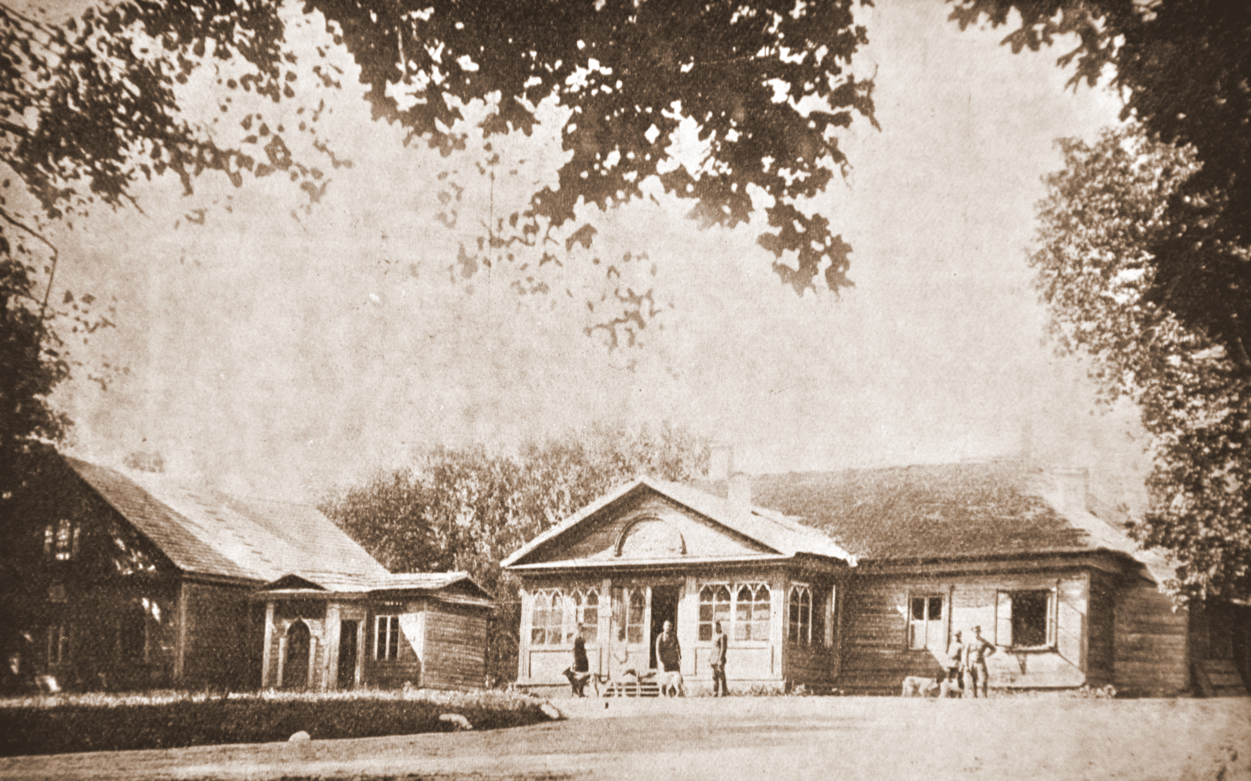 Oryginalny podpis pod zdjęciem: Koszary 18 szwadronu KOP